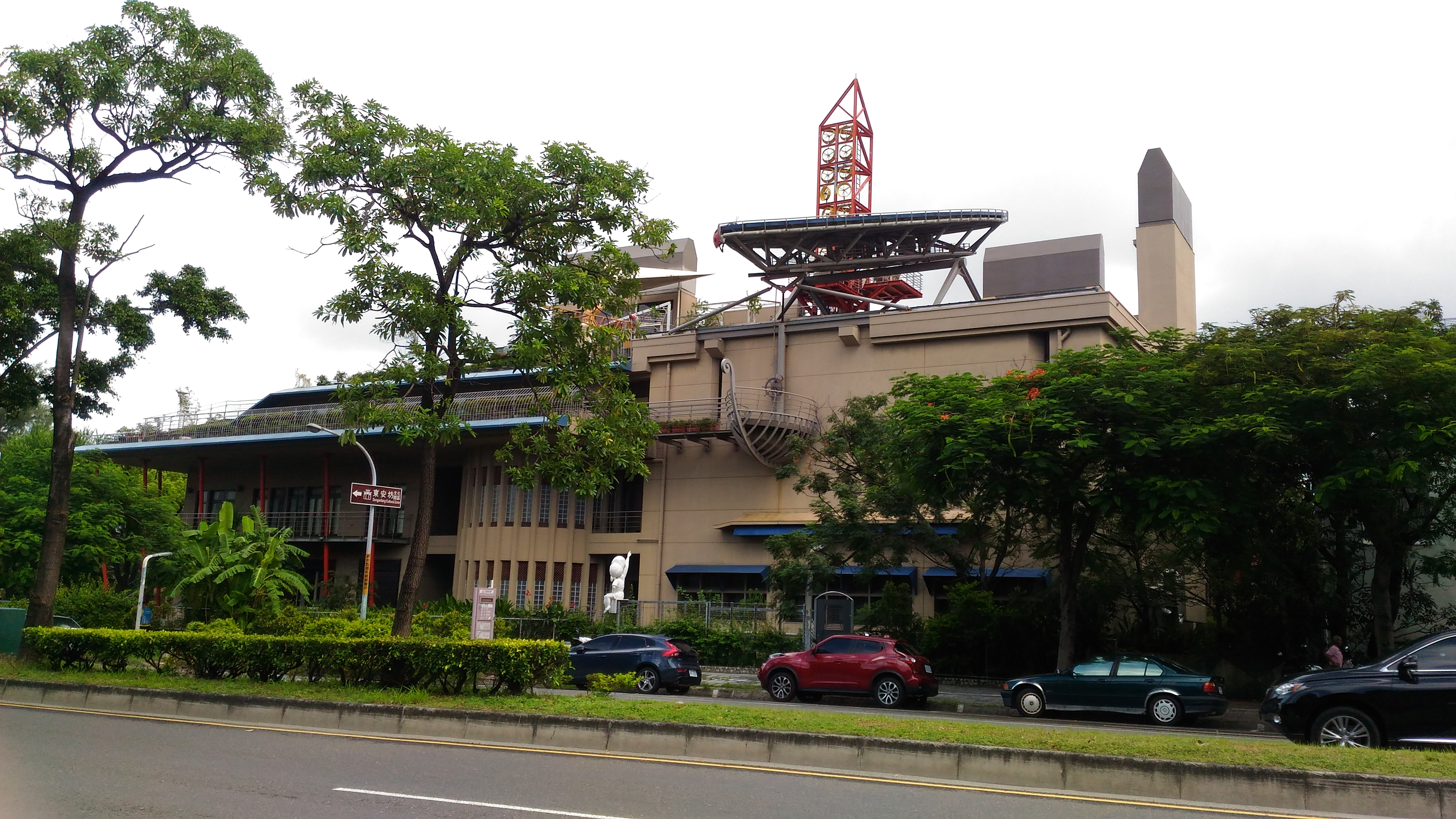 中文（台灣）: 位於台南市東區的成大孫運璿綠建築研究大樓—綠色魔法學校